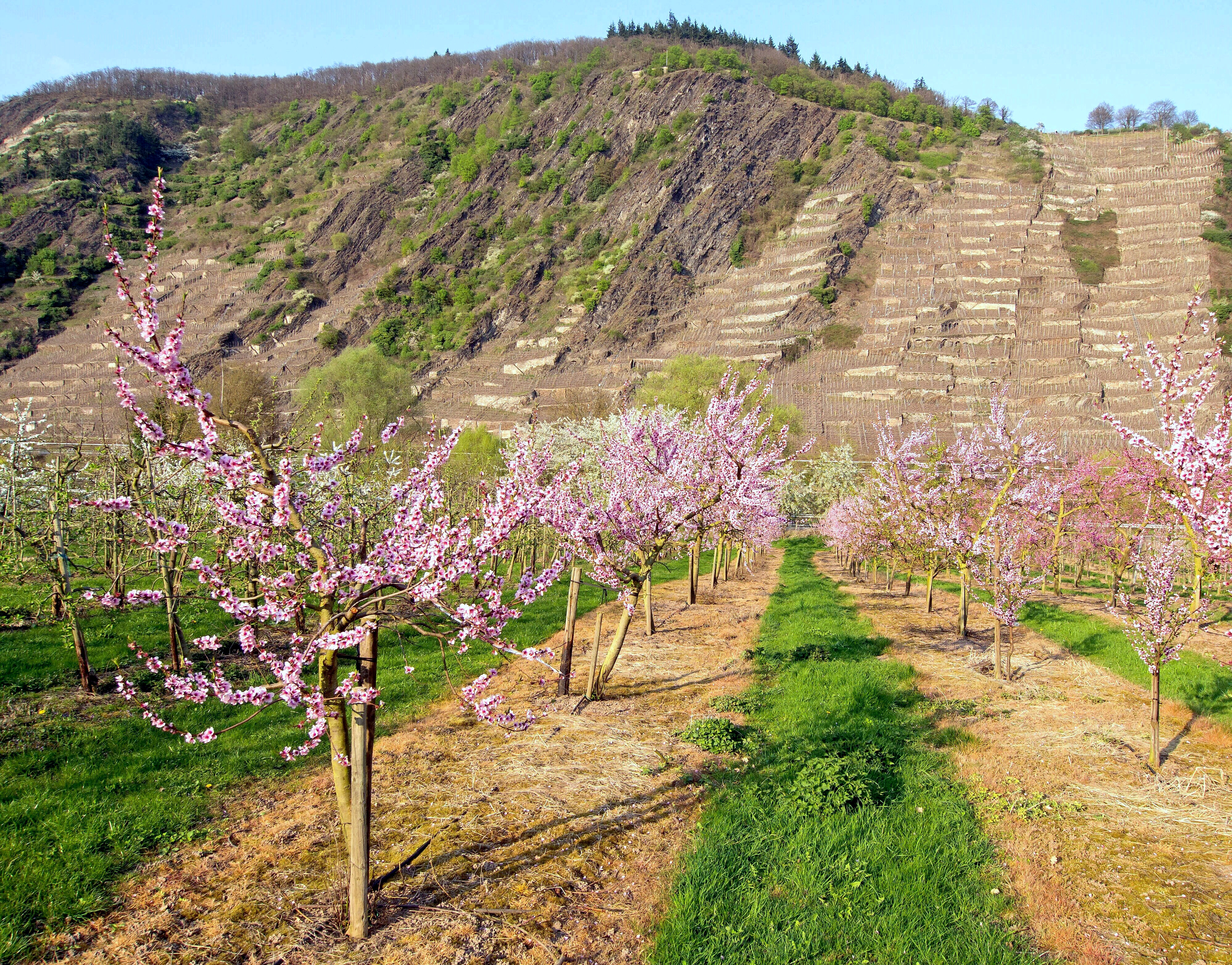 Die roten Moselweinbergpfirsische blühen im Dieblicher Moselbogen; gegenüber der Winninger Uhlen unterhalb der Blumslay.